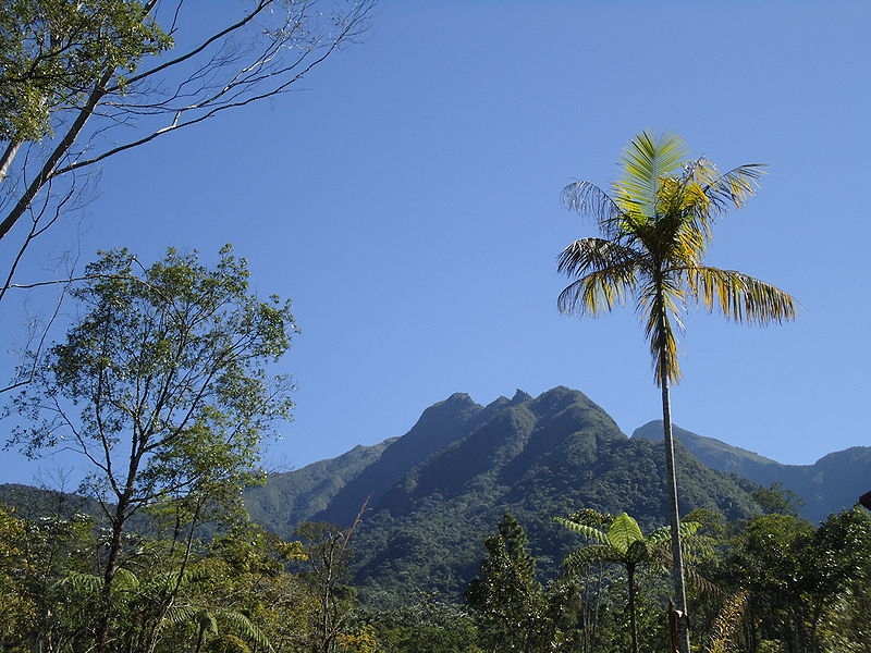 APA da Serrinha